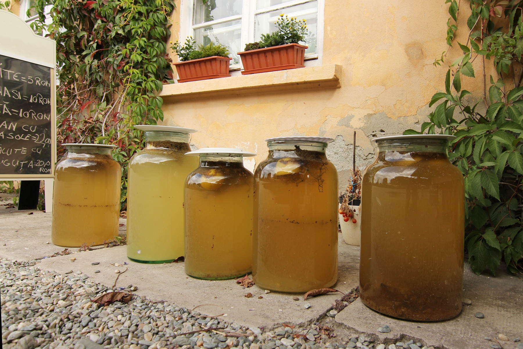 Borcane cu socată puse la fermentat